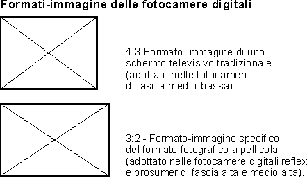 Formati immagine della fotografia digitale